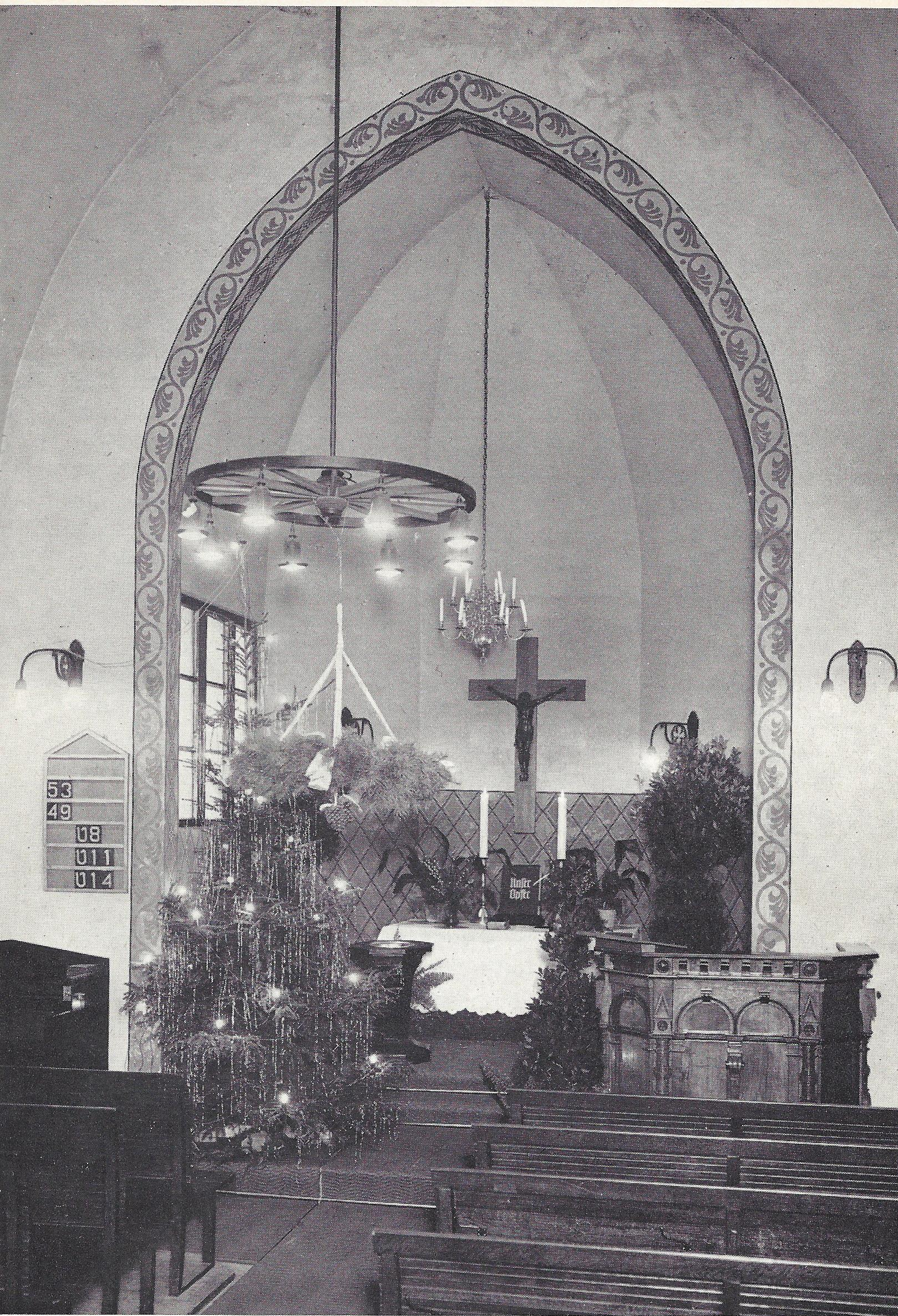 Provisorische Turmraumkapelle der Bürgermeister-Smidt-Gedächtniskirche in der Weihnachtszeit